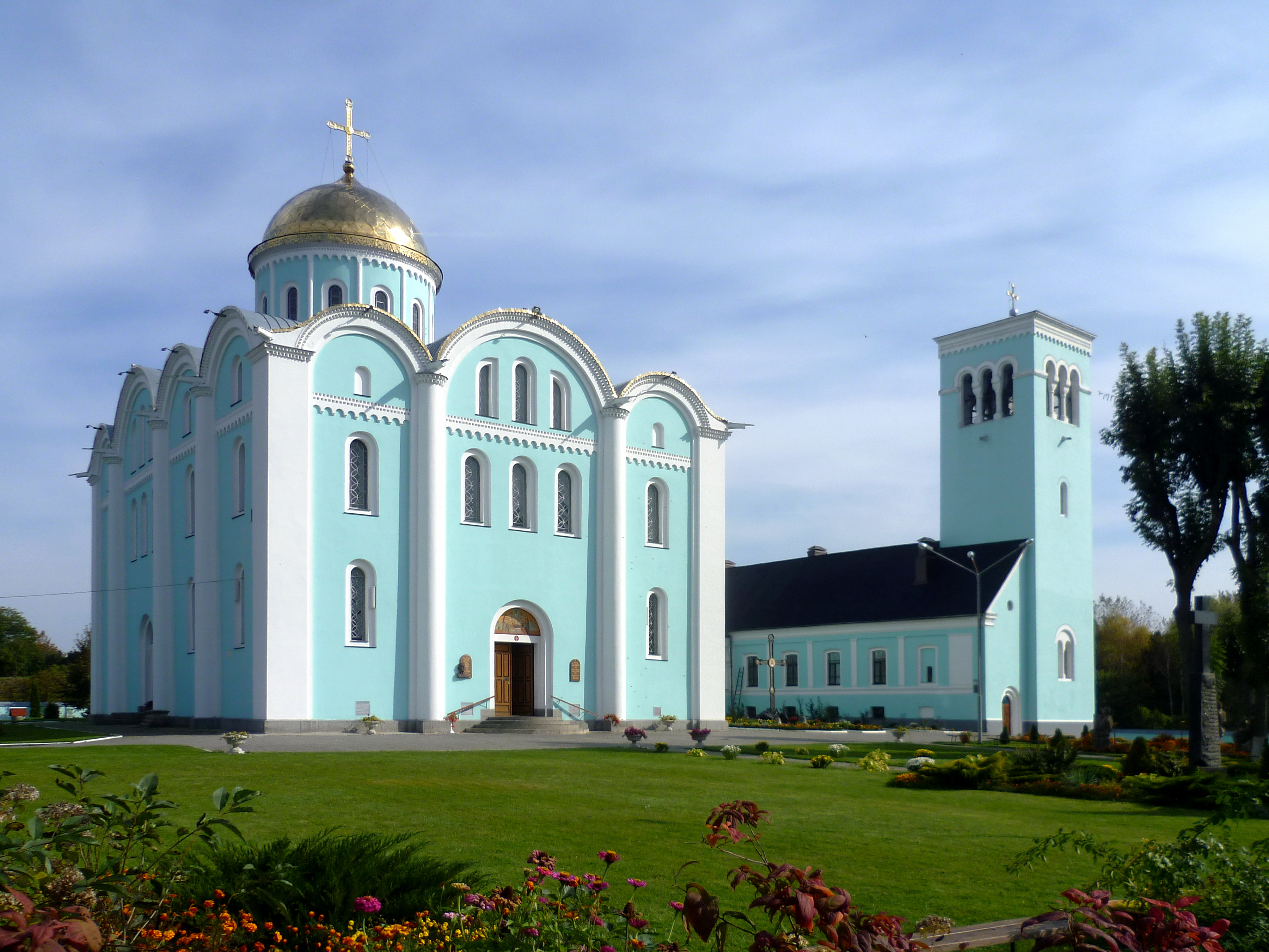 Комплекс Успенського собору (12-17 ст.) - Успенський собор (ліворуч), будинок з дзвіницею (праворуч) - м.Володимир-Волинський (вул. Соборна) Волинська область Україна